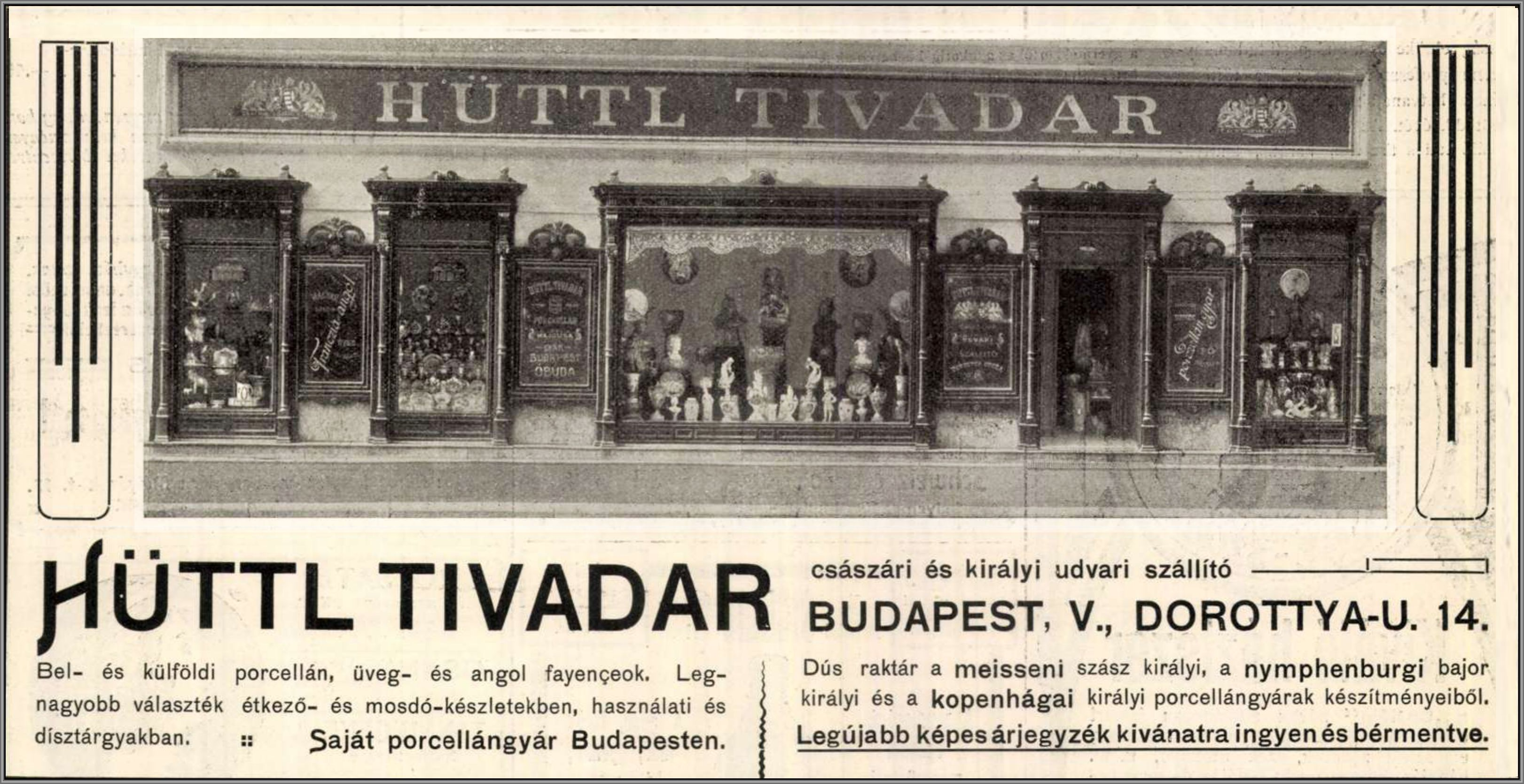 Id. Hüttl Tivadar (Loket, 1841. február 2. – Budapest, 1910. április 4.)[5] porcelán- és üvegáru nagykereskedő, kereskedelmi tanácsos. 1903-ban saját porcelángyárat alapított Budapesten.